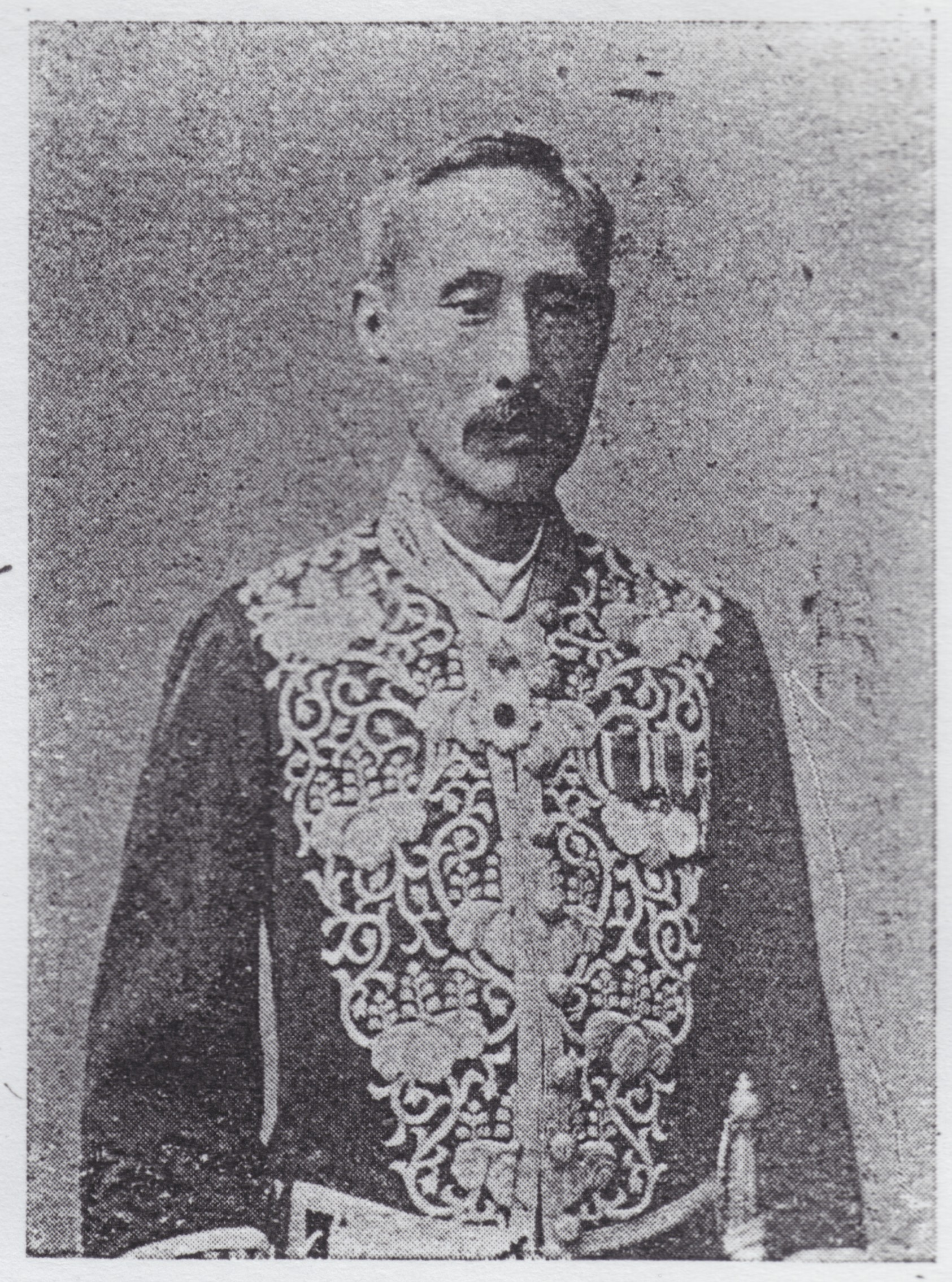 正二位侯爵久我通久の写真